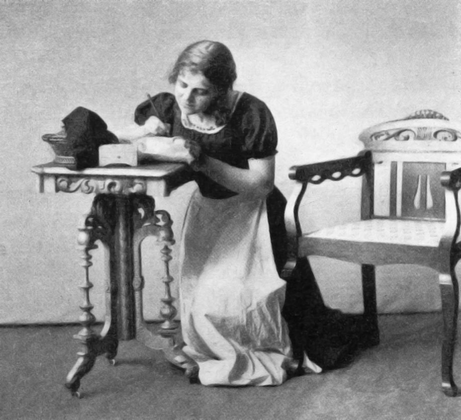 Aud Egede-Nissen, debut i Alt Heidelberg i 1911